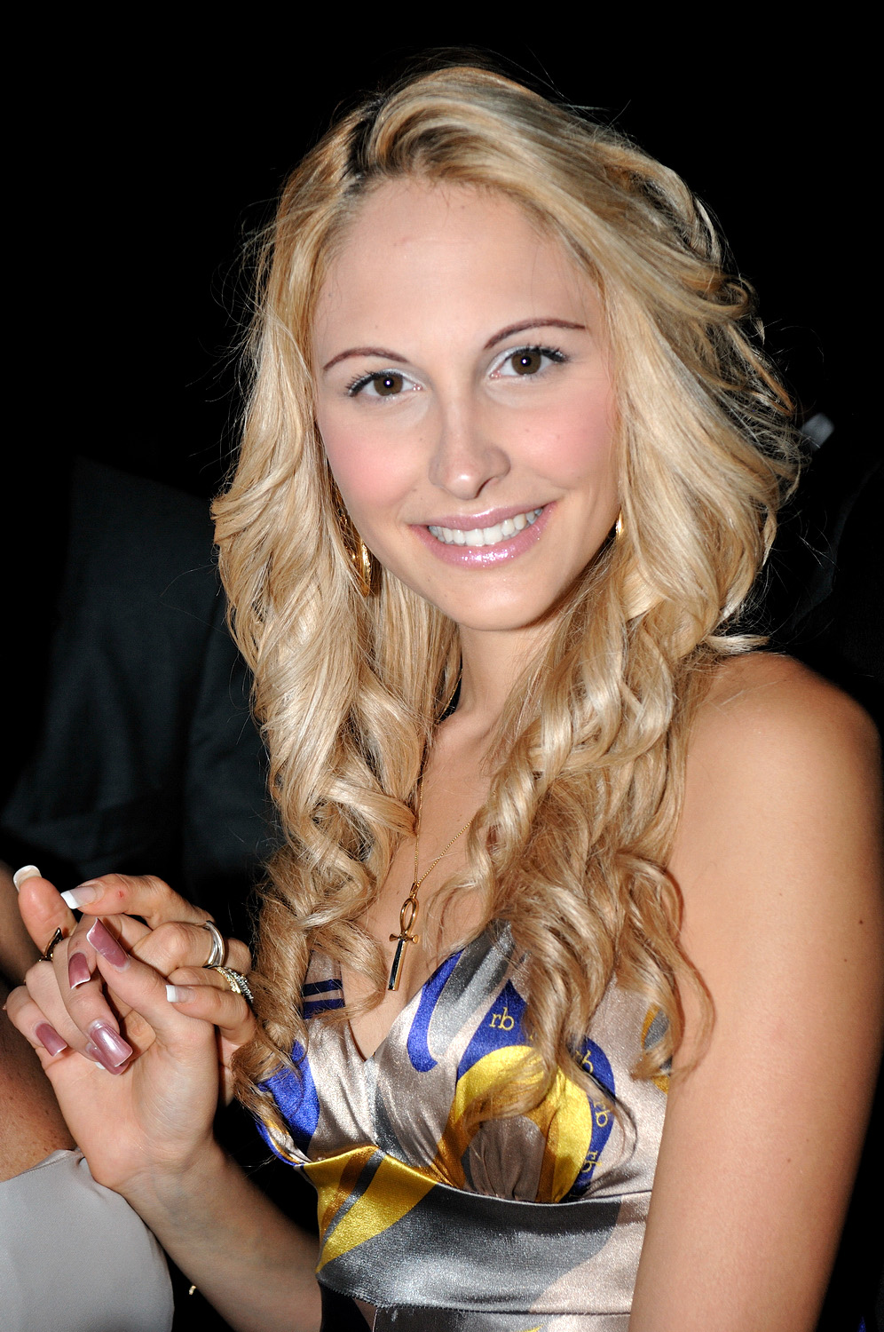 Noemi Letizia, quittant le Lido entourée d'une armée de garde du corps. 66ème Festival du Cinéma de Venise (Mostra), 8ème jour (08/09/2009).